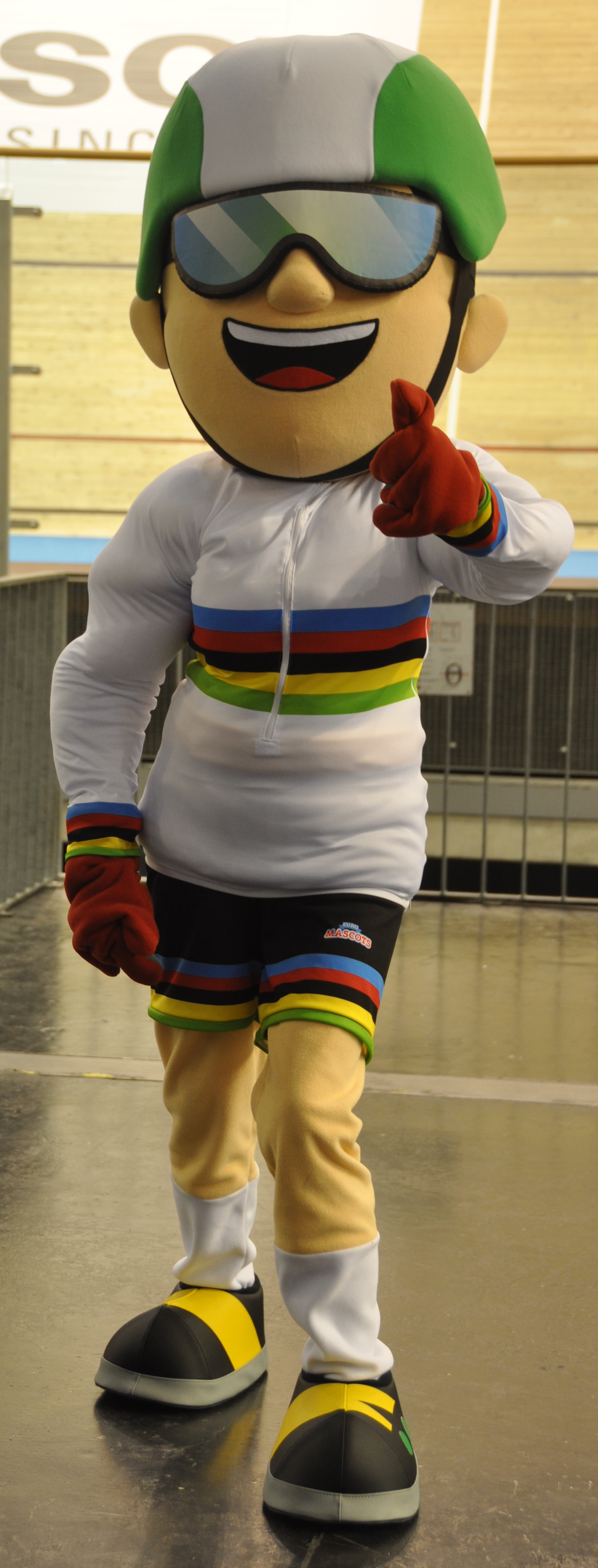 Das Maskottchen der UCI-Bahn-Weltmeisterschaften 2020 in Berlin